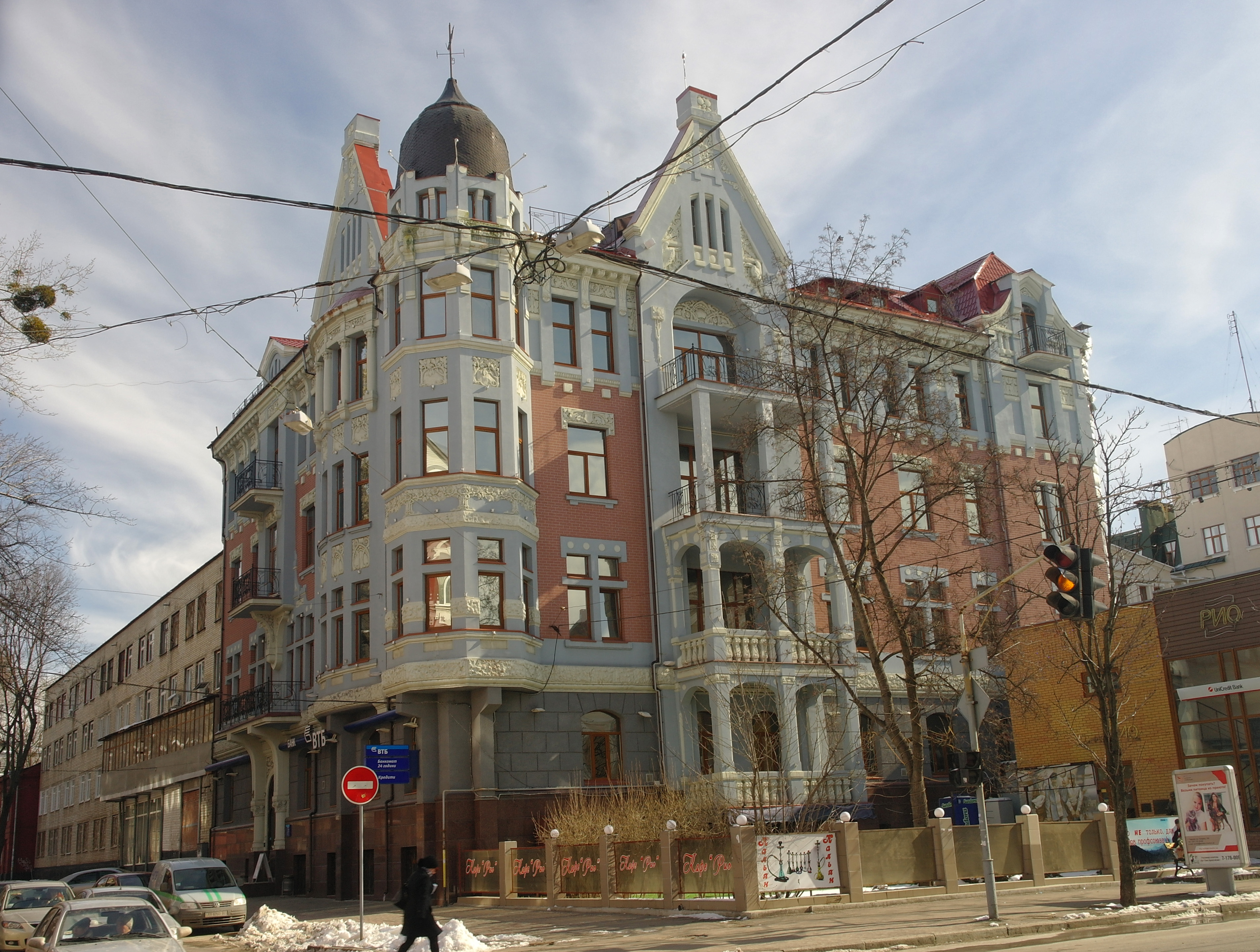 Харків, Чернишевська, 66